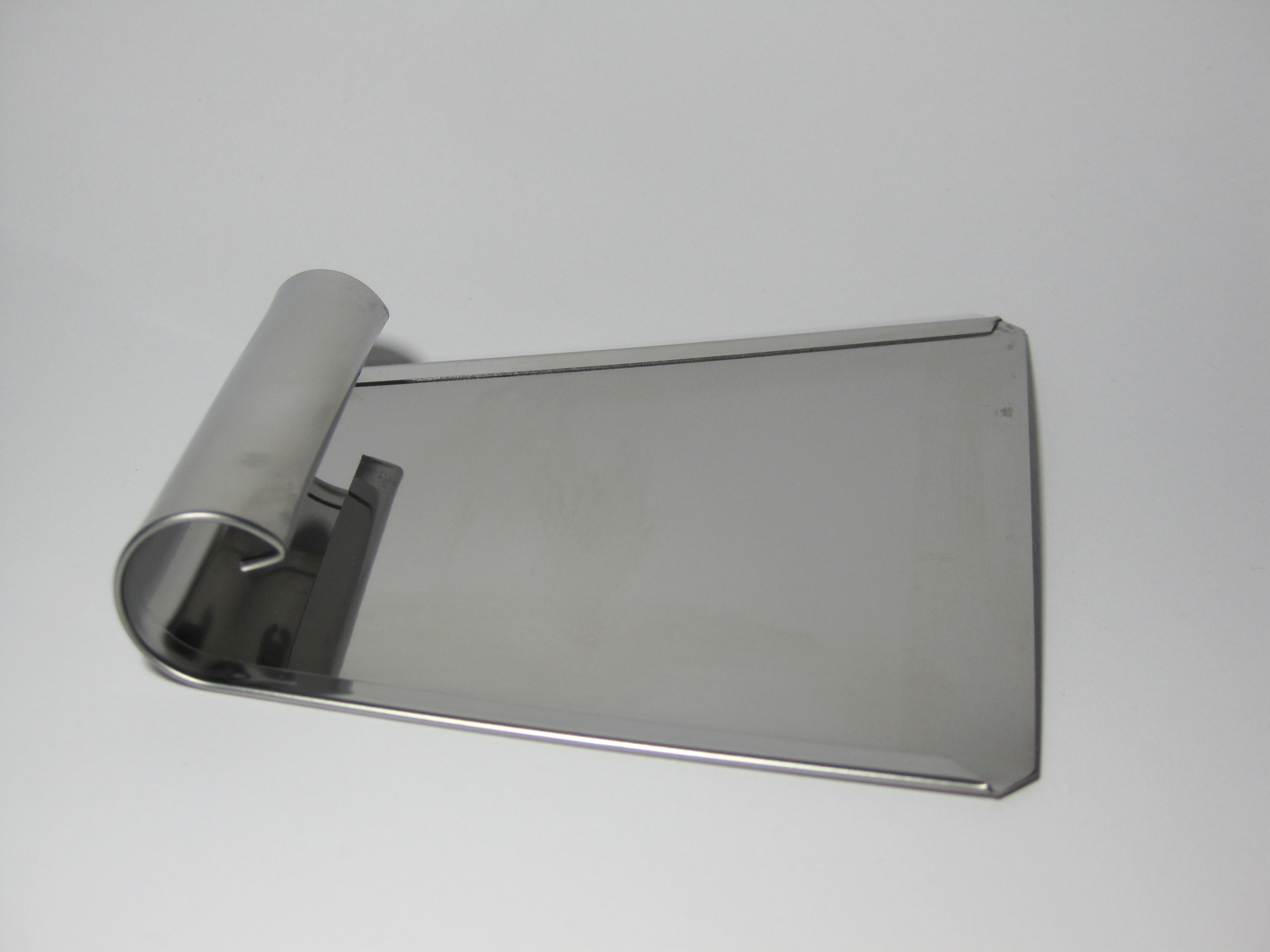 Spätzlesschaber. Damit schabt man den Spätzlesteig von einem Spätzlesbrett ins kochende Wasser.